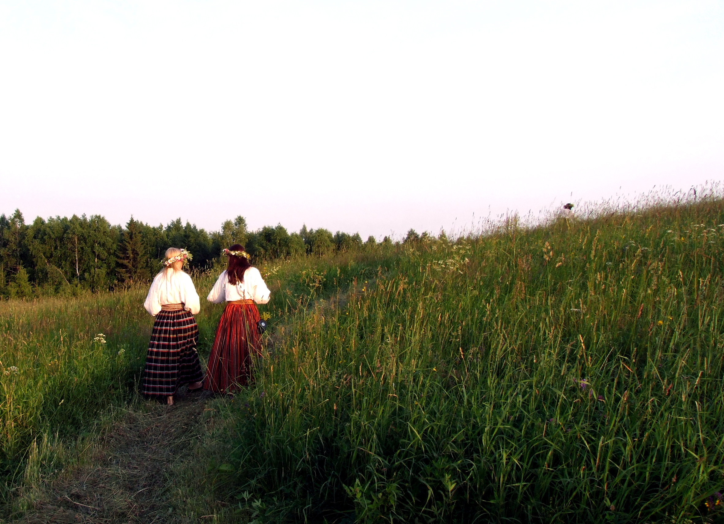 Latvian girls in midsummer eve